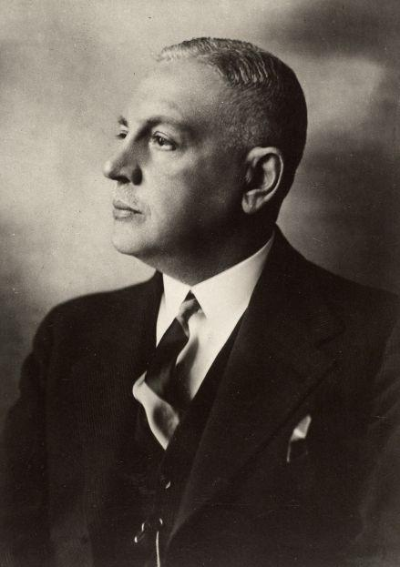 Portret van Ch.J.I.M. Welter, minister van Koloniën van 1925-1926, later opnieuw minister op dit departement van 1936-1941, en in dezelfde tijd Minister van Financiën a.i. Datum onbekend.